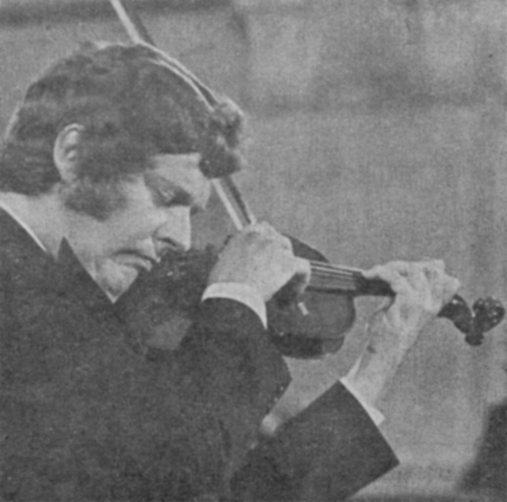 Konstanty Andrzej Kulka (gdański skrzypek) - 26.08.1980 r., Poznań.